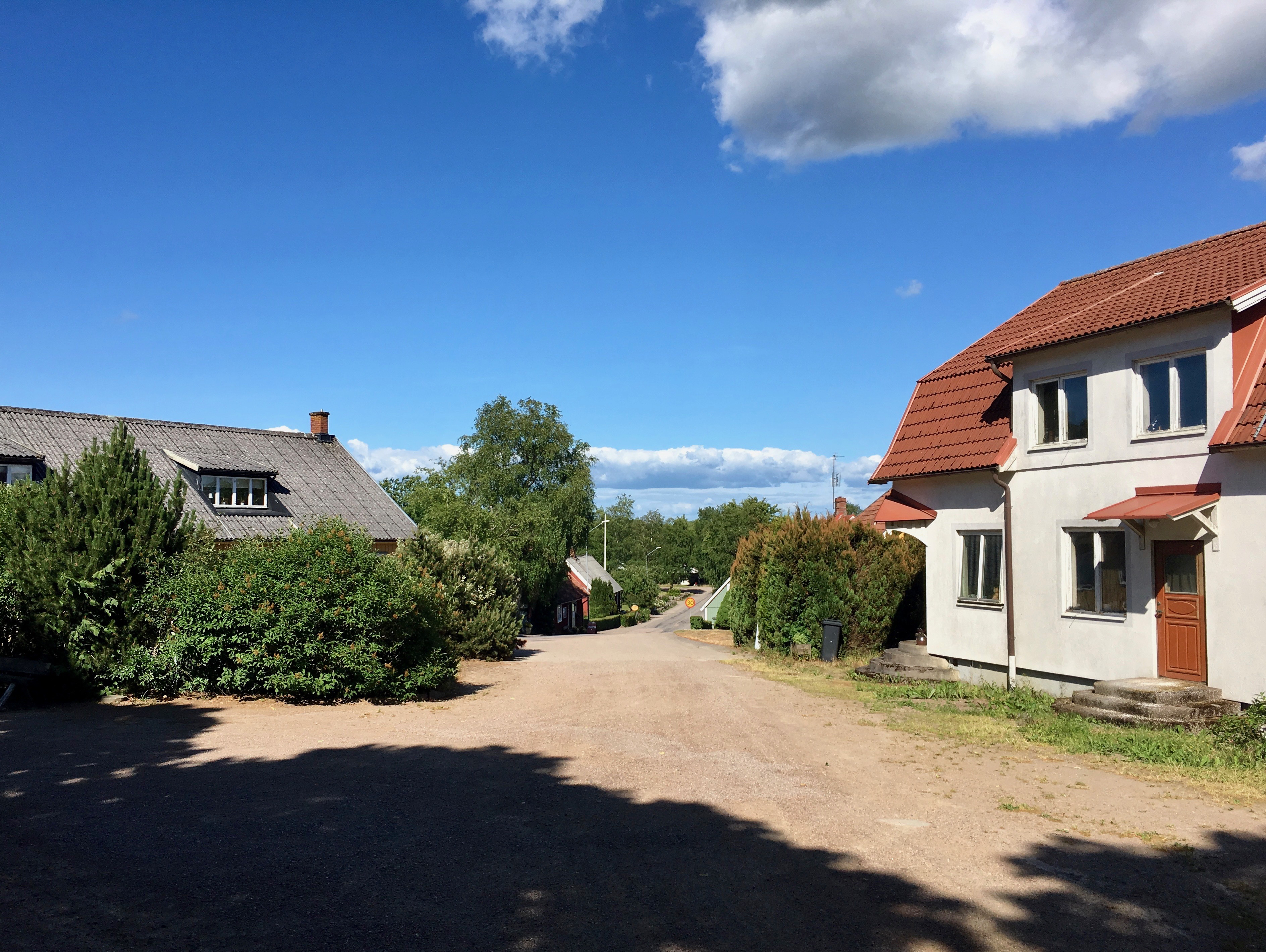 Stenestad, Skåne